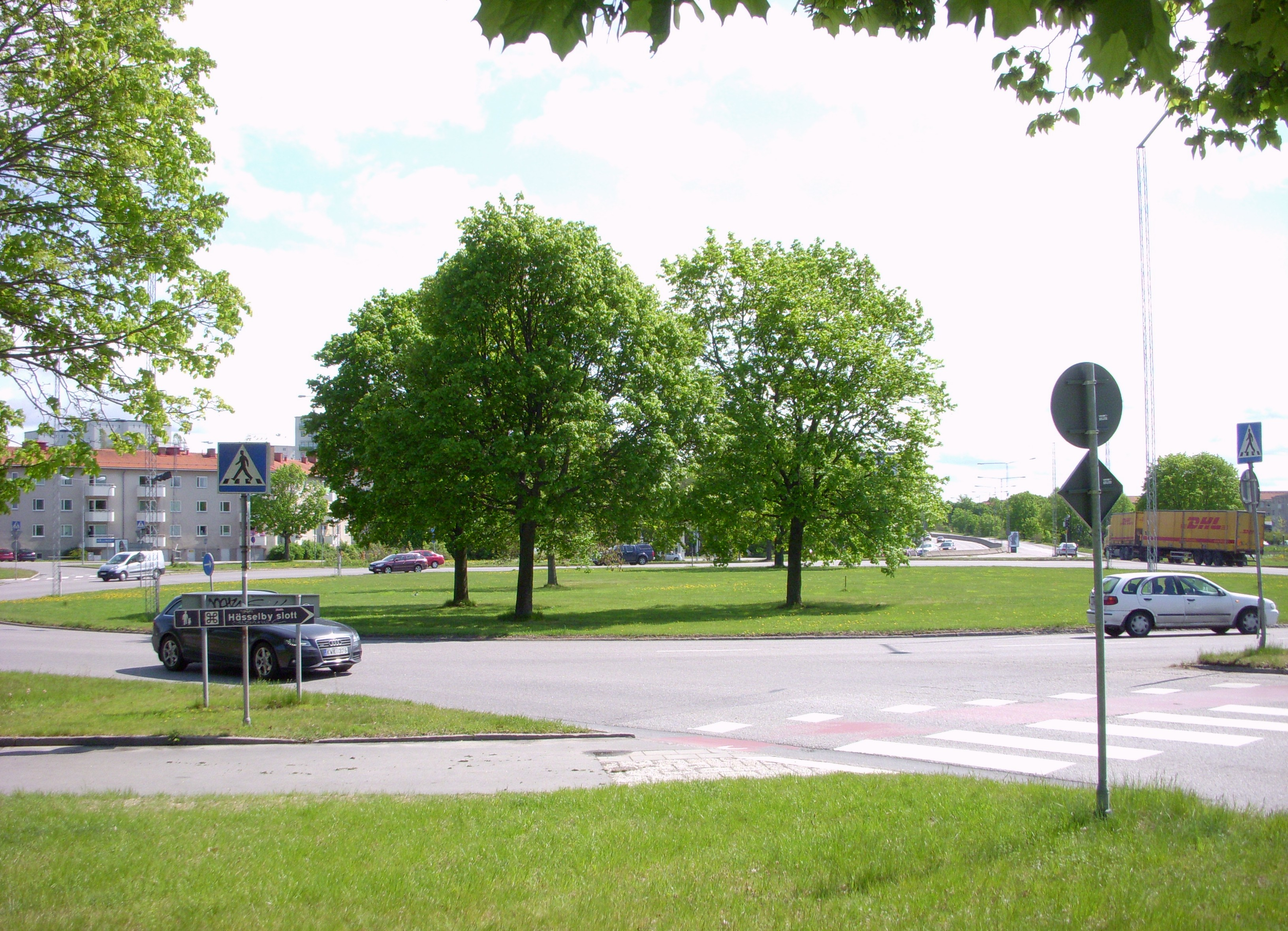 Cirkulationsplatsen "Bergslagsplan" i Hässelby/Vällingby